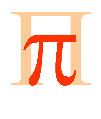 Greek letter